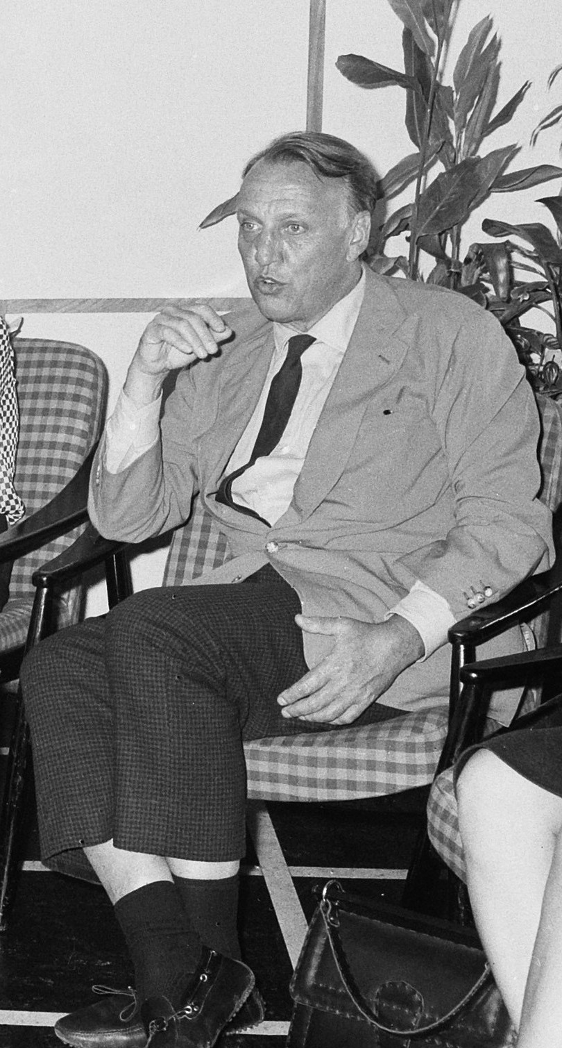 "Modesty Blaise" film van Amerikaan Joseph Losey. Filmopnamen te Amsterdam. Regisseur Joseph Losey